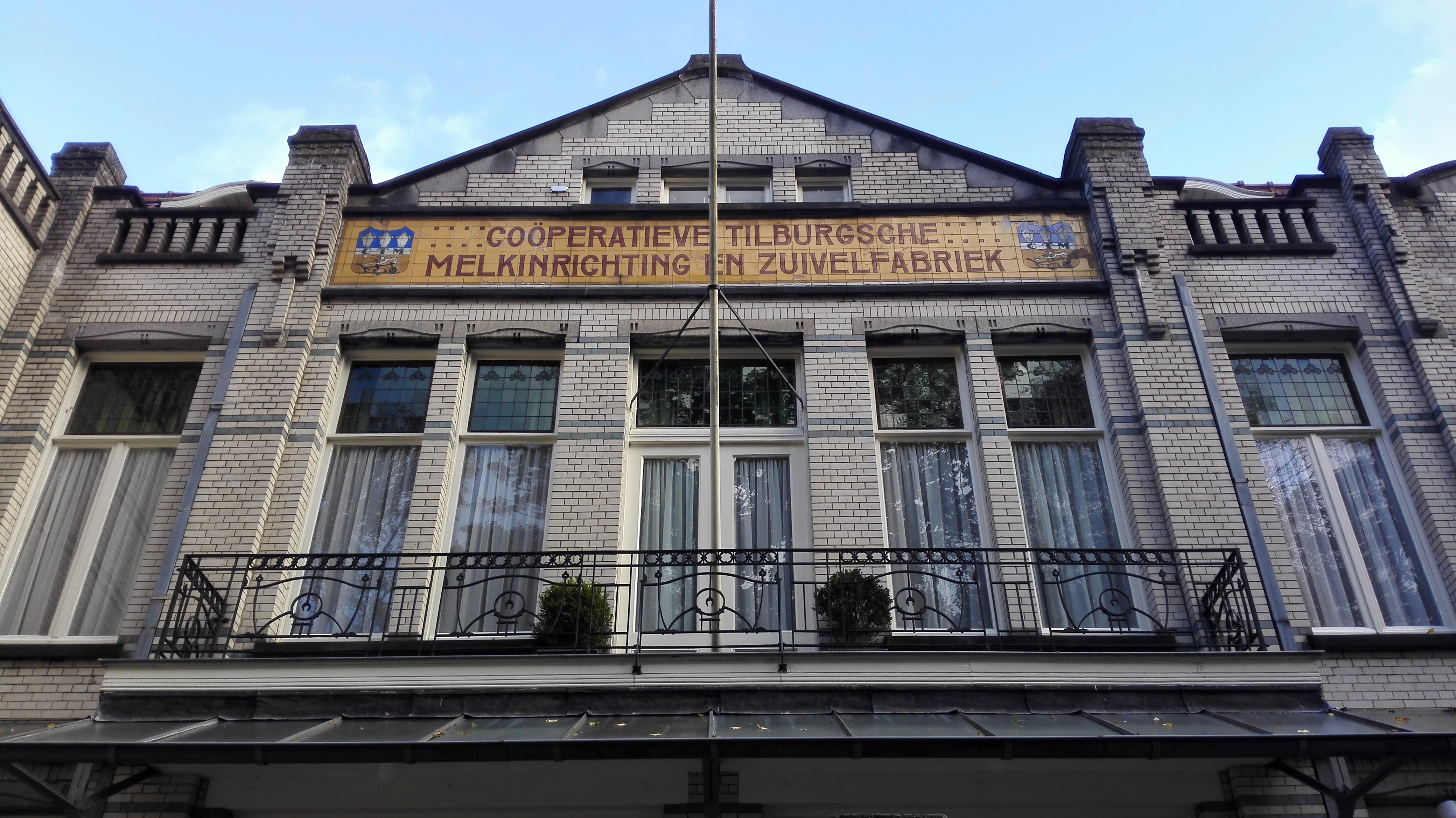 Wilhelminapark 63 (woning boven) en 63A (Galerie Via Venezia), Tilburg, voormalige melkfabriek Coöperatieve Tilburgsche Melkinrichting en Zuivelfabriek (C.T.M.), later Campina.